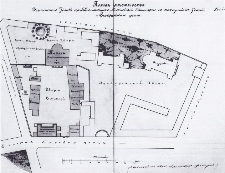 Магілёў. Комплекс пабудоў духоўнай семінарыі і рэзідэнцыя архірэя ў першай палове XIX ст.